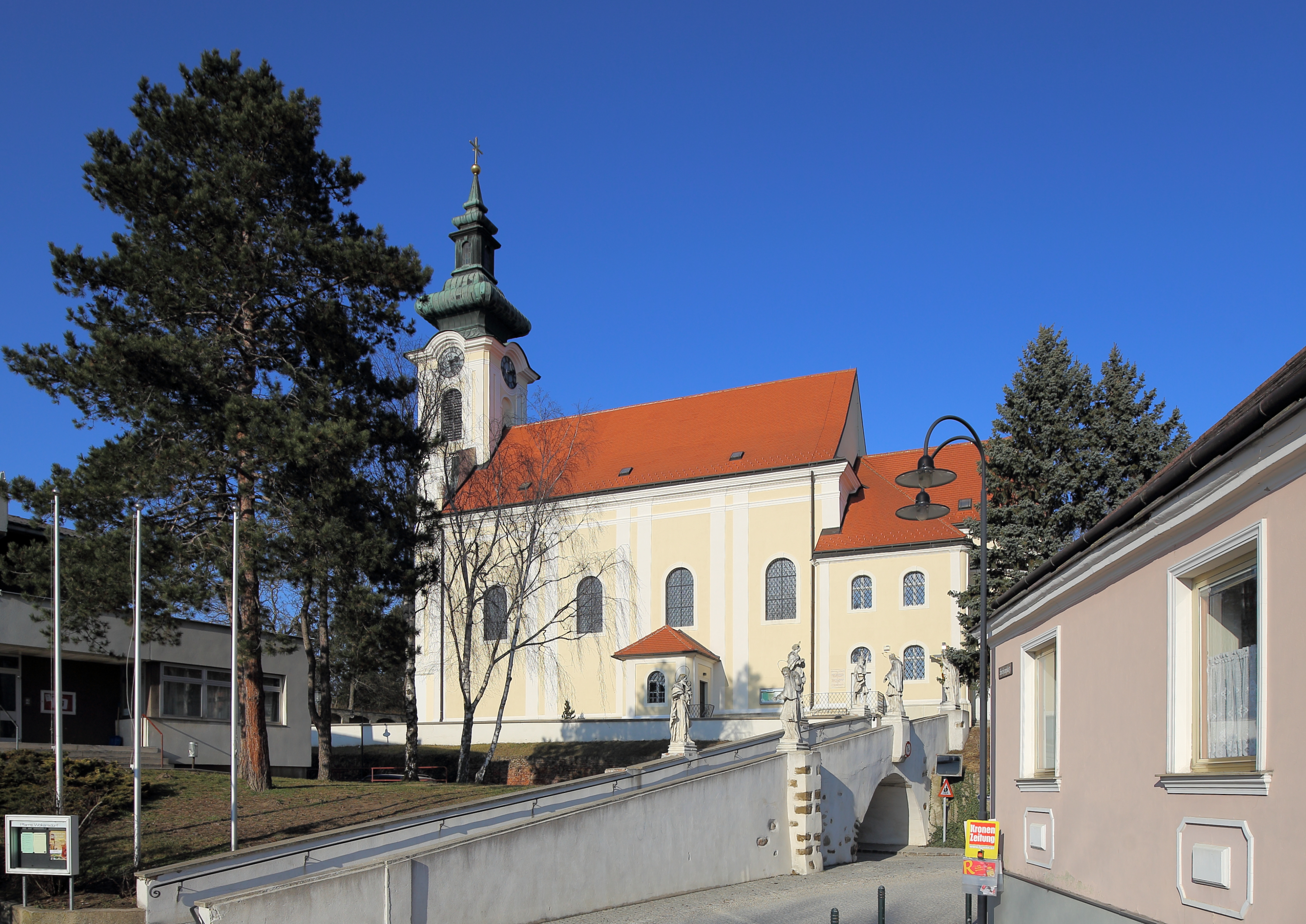 Katholische Pfarrkirche hl. Margaretha in der niederösterreichischen Stadtgemeinde Wolkersdorf im Weinviertel.